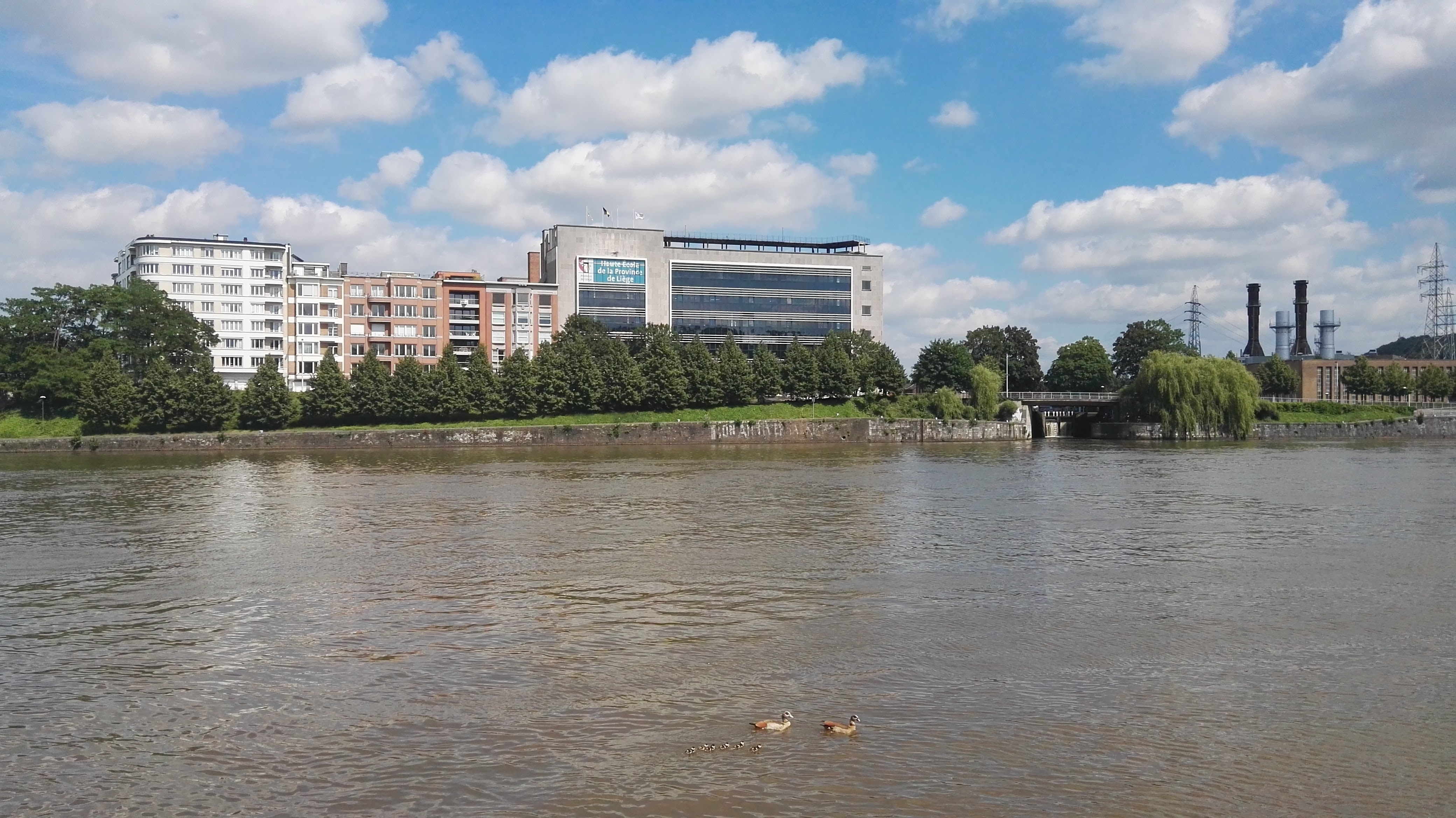 Haute Ecole de la Province de Liège (HEPL) — Catégorie Technique — Site Gloesener.